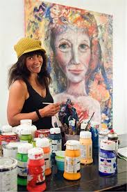 Susanne Demåne